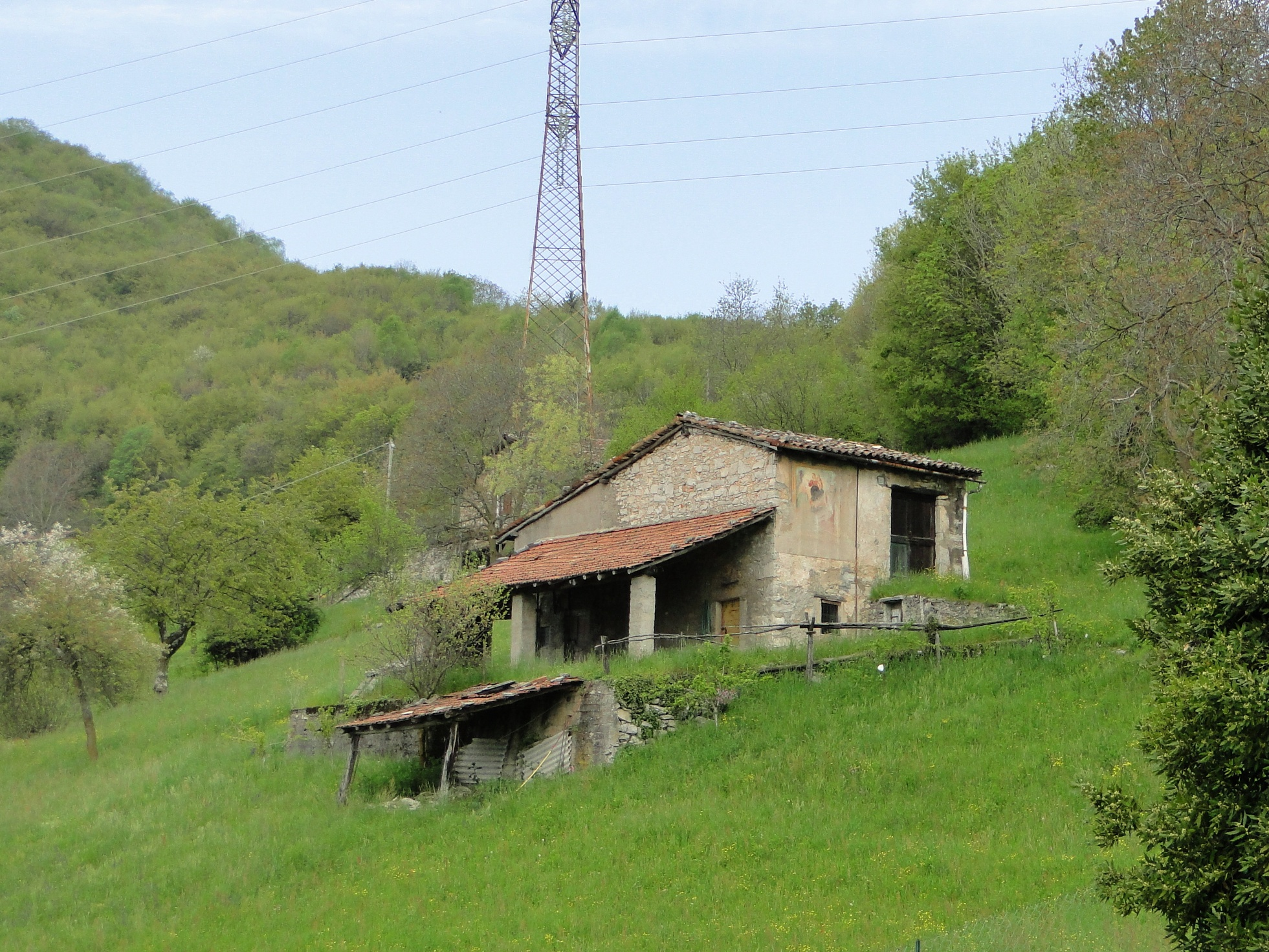 Rustico presso Orezzo, frazione di Gazzaniga (BG), Italia